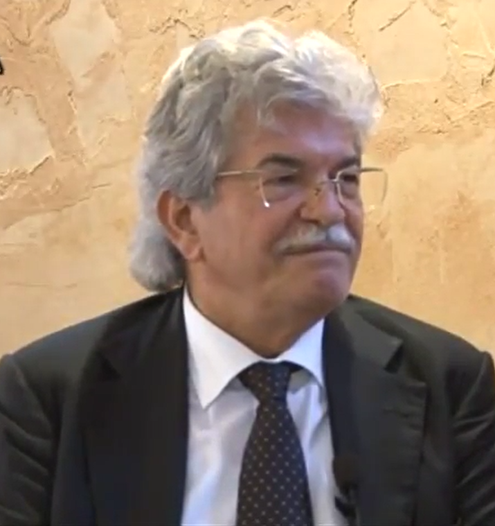 Il senatore Antonio Razzi intervistato dall'emittente televisiva abruzzese TVSEI